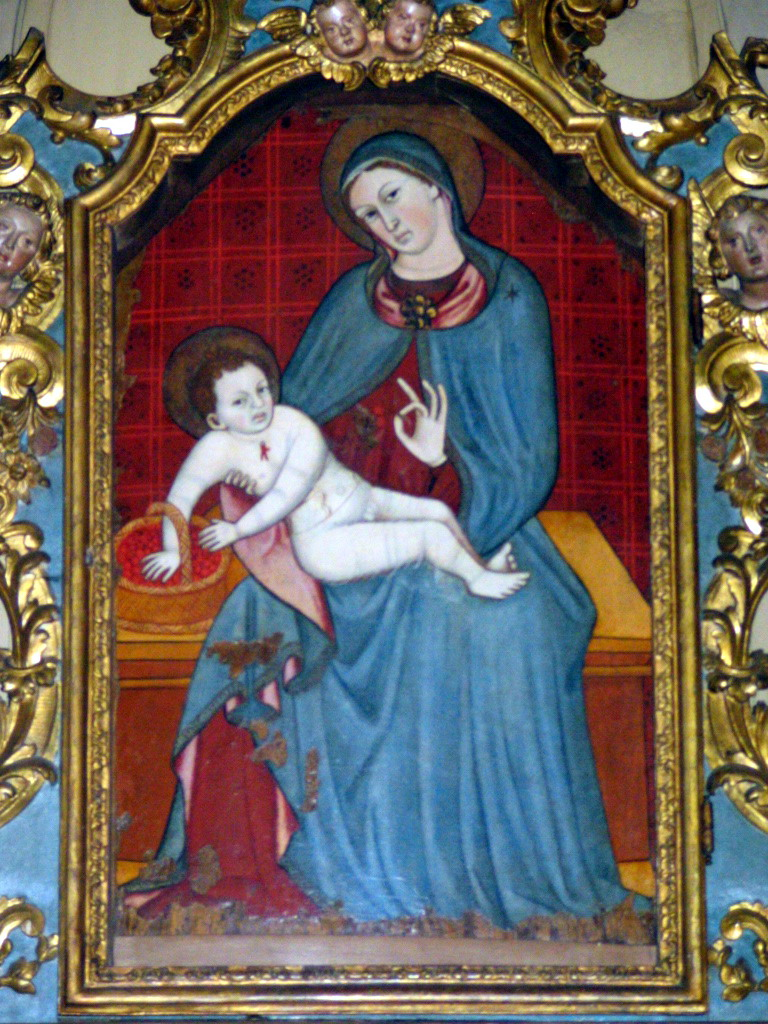 Asti, Chiesa di Santa Maria di Viatosto: interno, tavola lignea trecentesca raffigurante la Madonna con il Bambino, detta Madonna delle ciliegie.